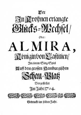 Erste Seite des gedruckten Textbuches zur Uraufführung von ALMIRA 1705 an der Hamburger Gänsemarktoper